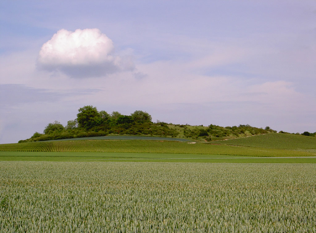 Auteur : Jean-Louis Perard